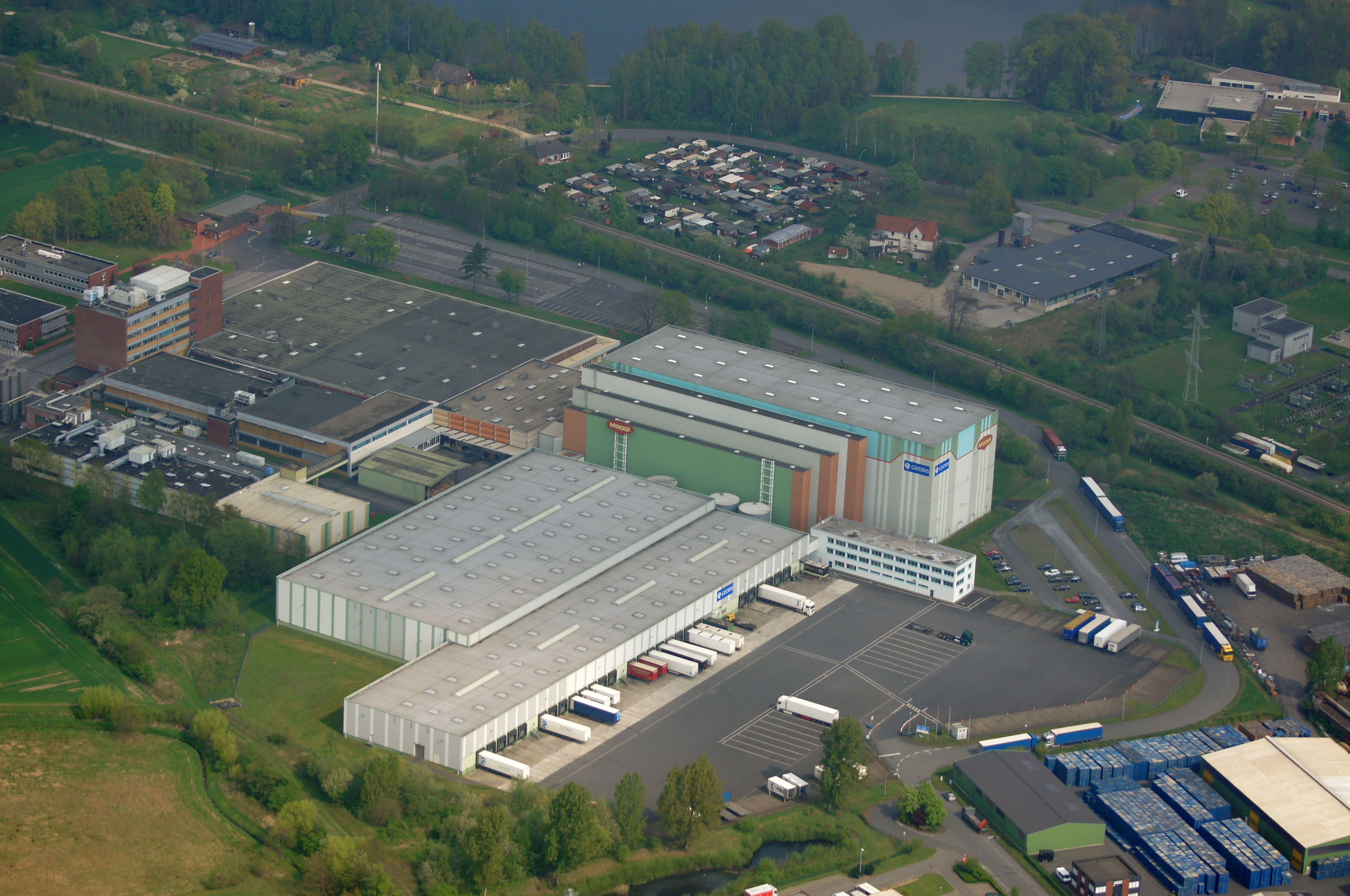 Das Distributionslager von Geodis Logistics in Lüdinghausen. Der Logistikdienstleister übernimmt hier Lagerung, Kommissionierung und Distribution von Nestlés Maggi-Produkten, die aus dem benachbarten Maggi-Werk per automatischer Fördertechnik angeliefert werden. Die Aufnahme entstand während des Münsterland-Fotoflugs am 12. April 2014.